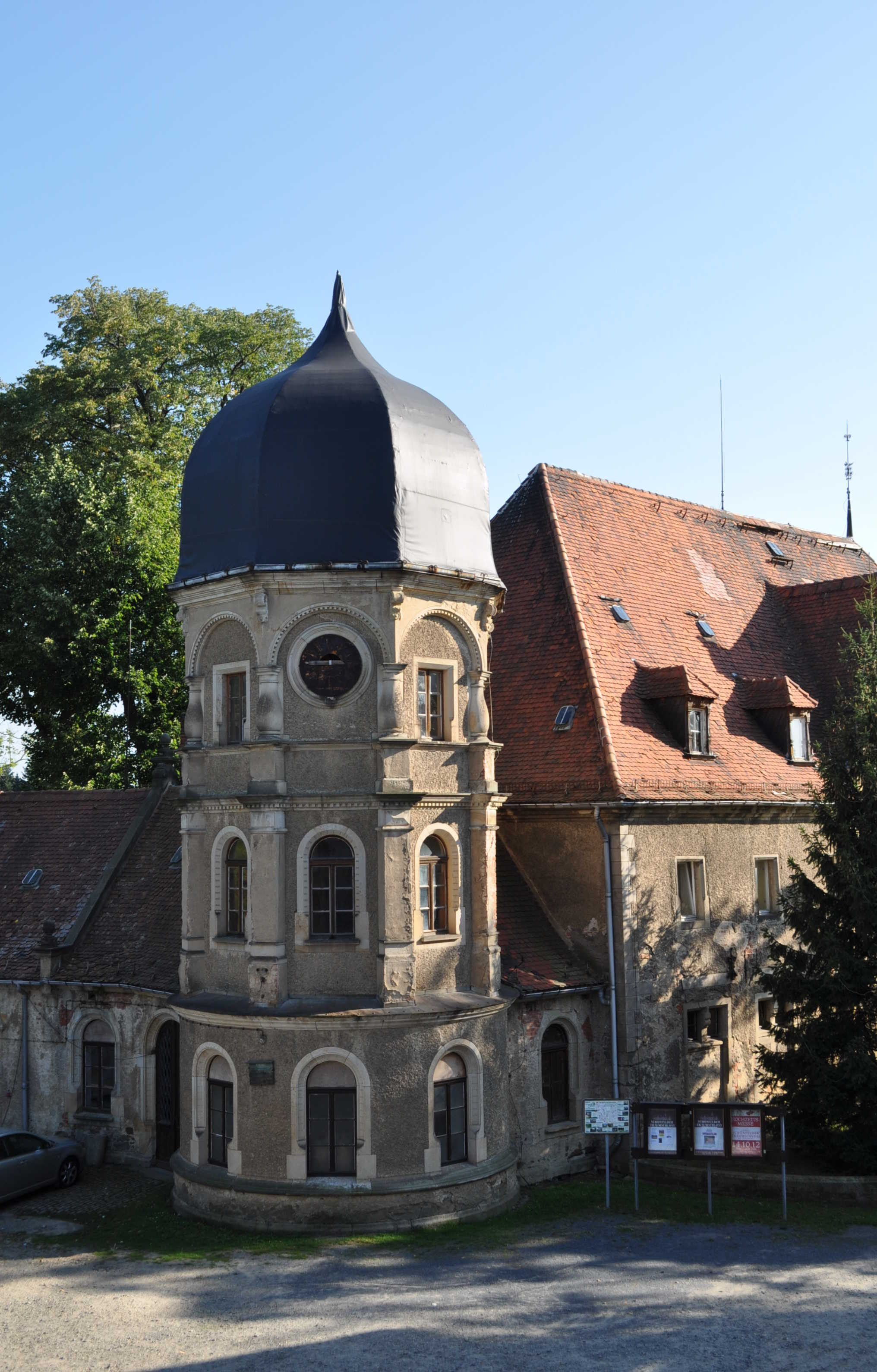 Schloss Schönfeld in der Gemeinde Schönfeld (Sachsen). Erstmals im 13. Jahrhundert urkundlich erwähnt und im Laufe der Jahrhunderte weiter ausgebaut. Es ist heute eines der bedeutendsten Neorenaissanceschlösser Sachsens. Kleines Schloss mit Wasserturm.